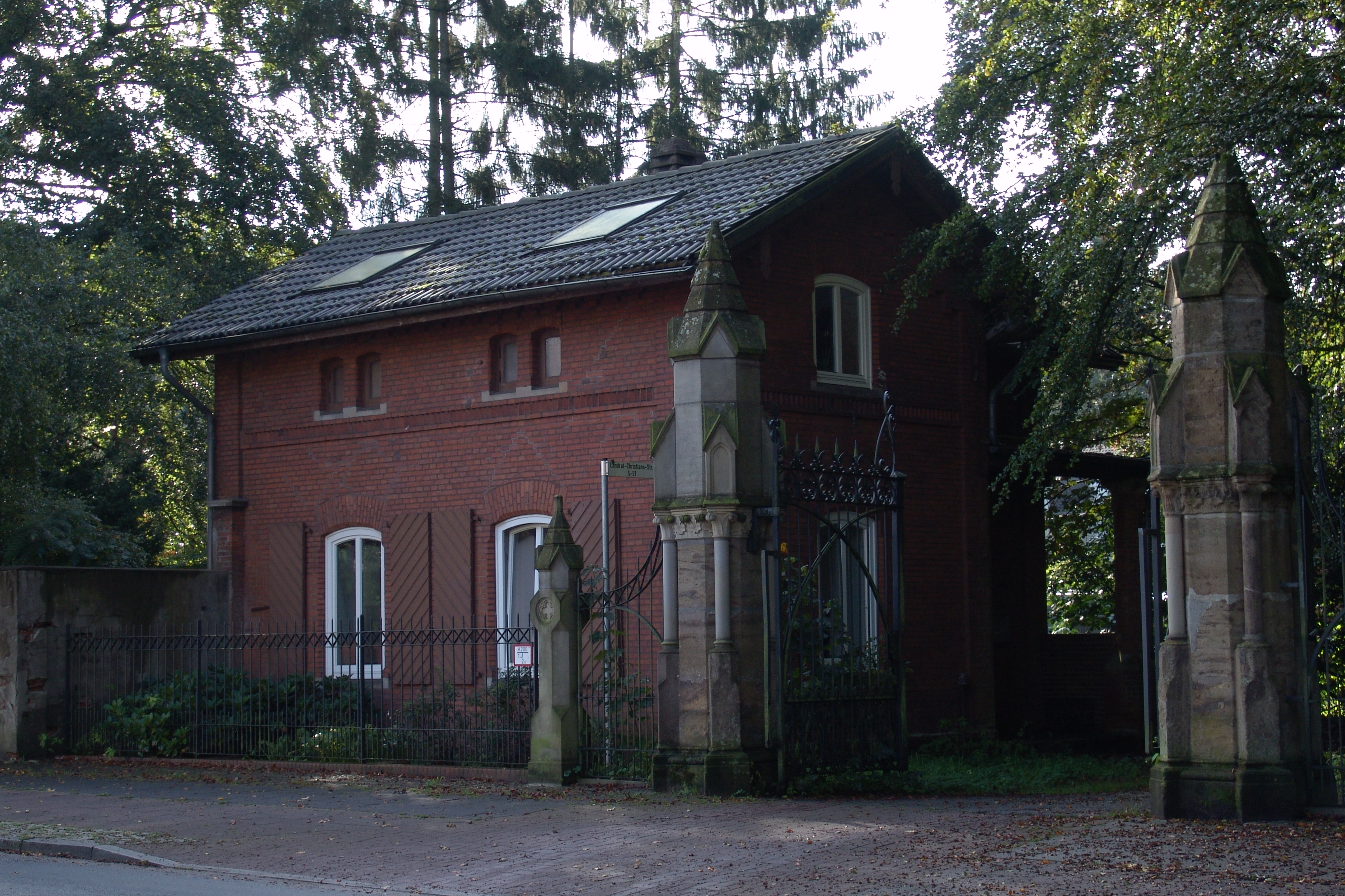 Wätjens Landgut, Pförtnerhaus in Bremen, Landrat-Christians-Straße 25.Das abgebildete Objekt ist ein geschütztes Kulturdenkmal in der Freien Hansestadt Bremen, mit der Nr. 1766 beim Landesamt für Denkmalpflege registriert.